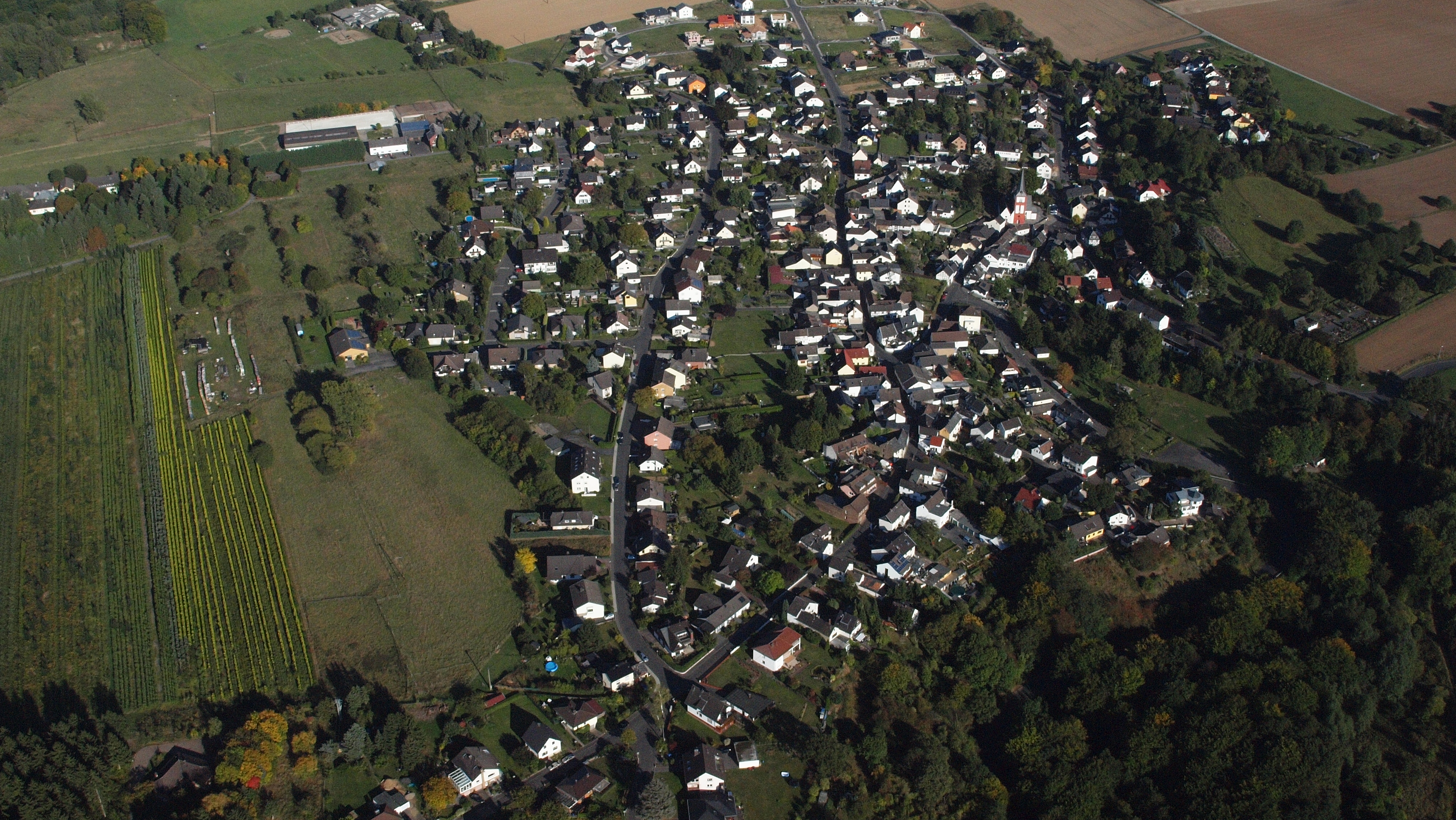 Bruchhausen